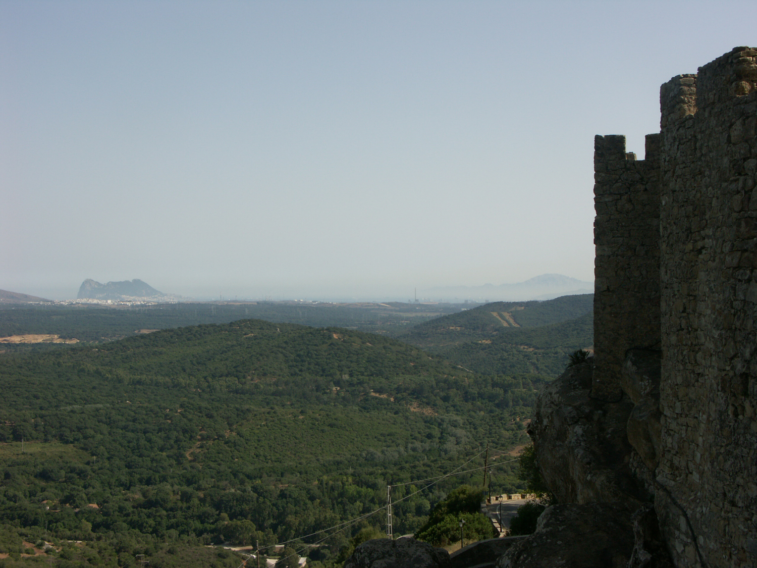 Castellar2(panorama)